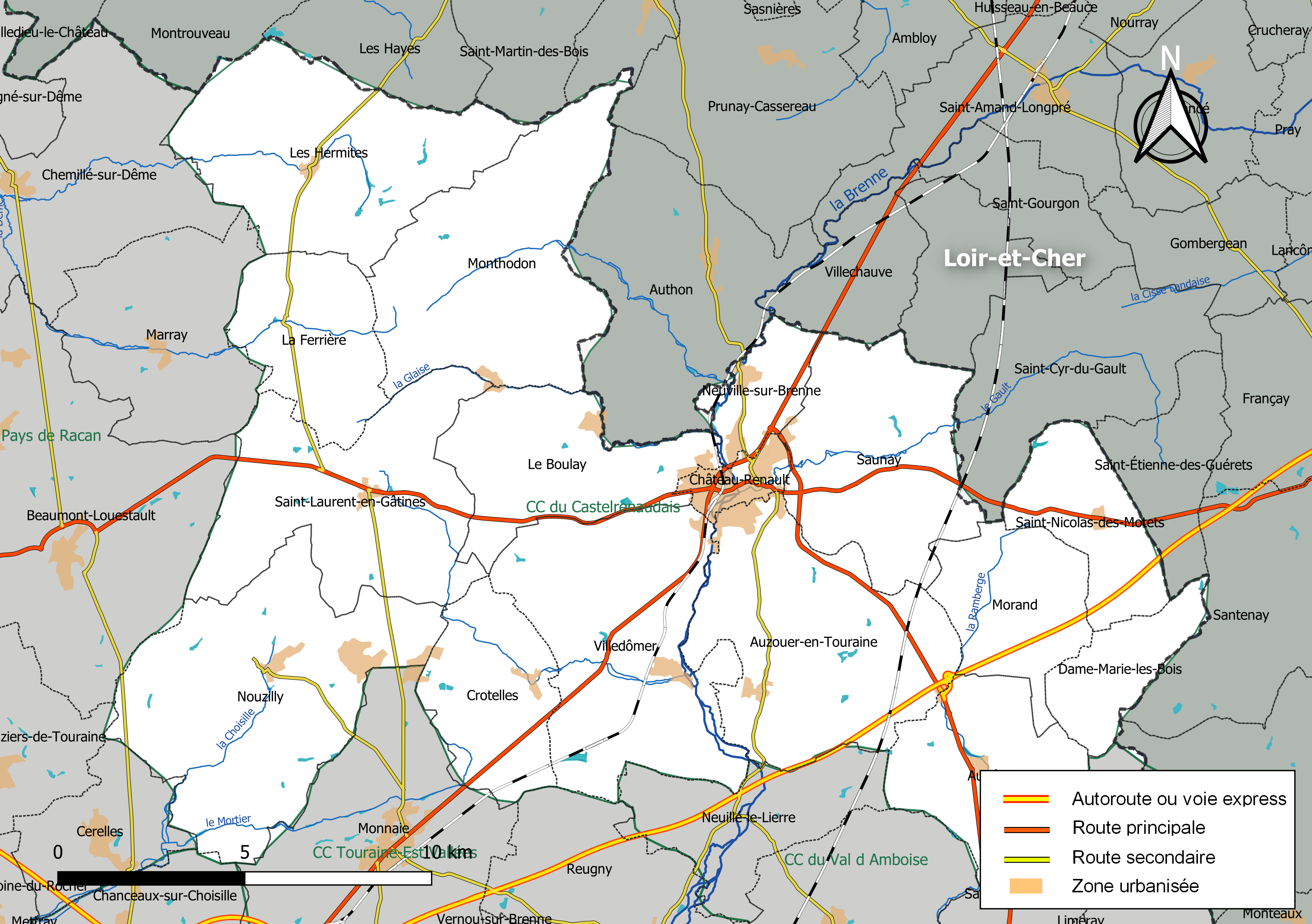 Carte de la communauté de communes du Castelrenaudais, département d'Indre-et-Loire, France. Composition au 1er janvier 2019.